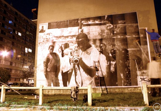 28 Millimètres, Portrait d'une Génération Collage Ladj Ly by JR, Montfermeil, Les Bosquets, 2004